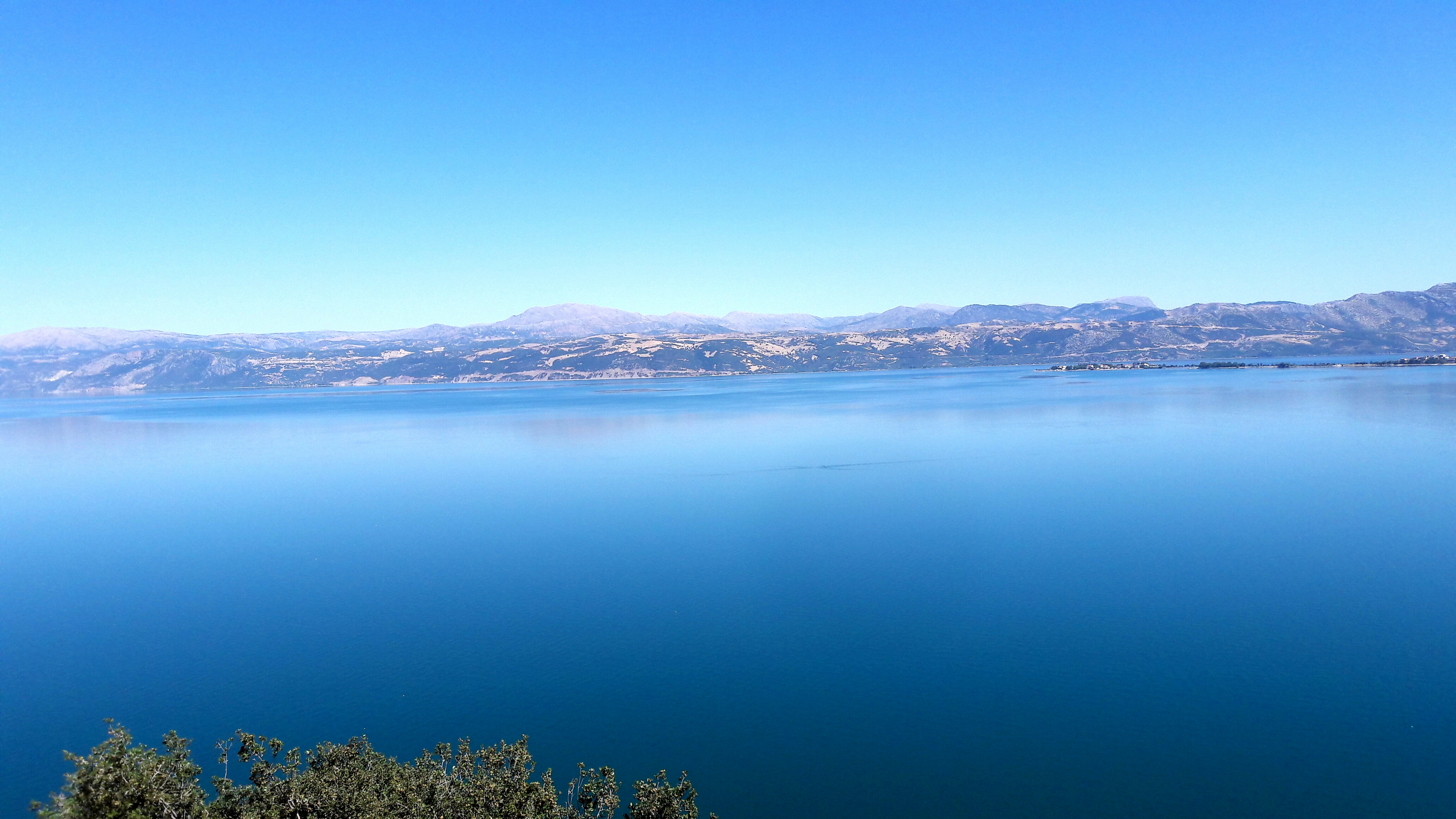 Eğirdir Lake